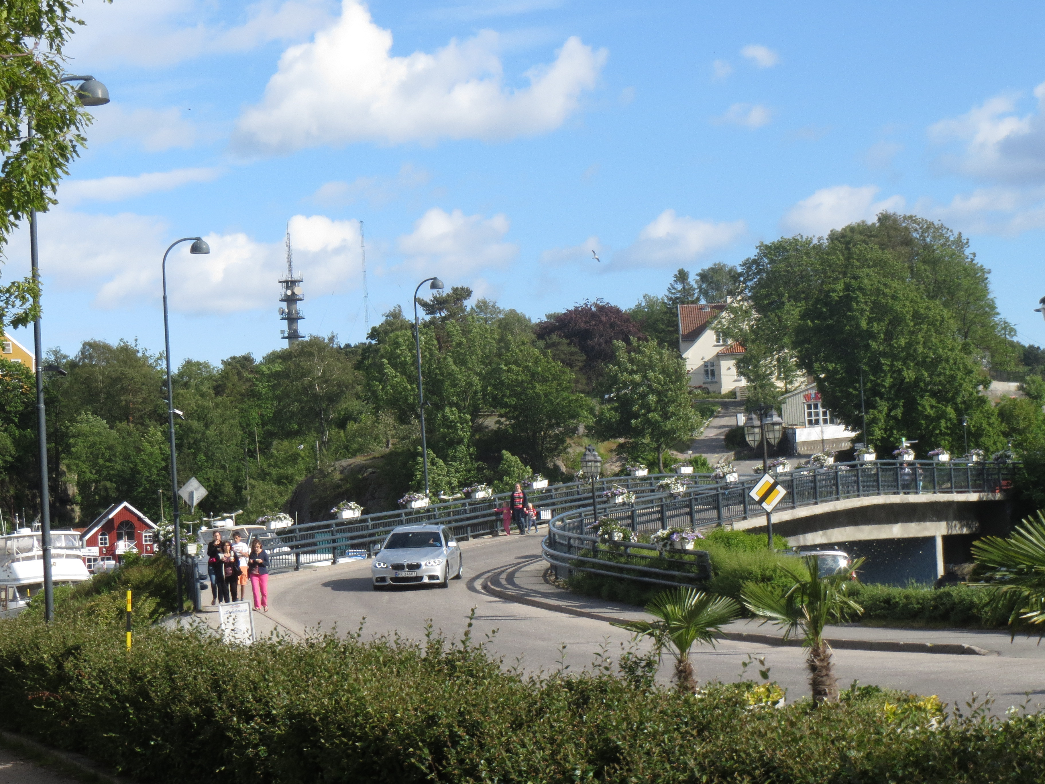 Odderøya sett fra Gravane